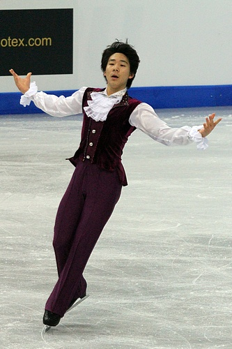 Lee June-Hyoung (Южная Корея) на чемпионате мира по фигурному катанию среди юниров 2012